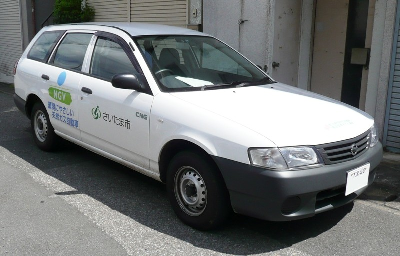 Nissan AD Van CNG.